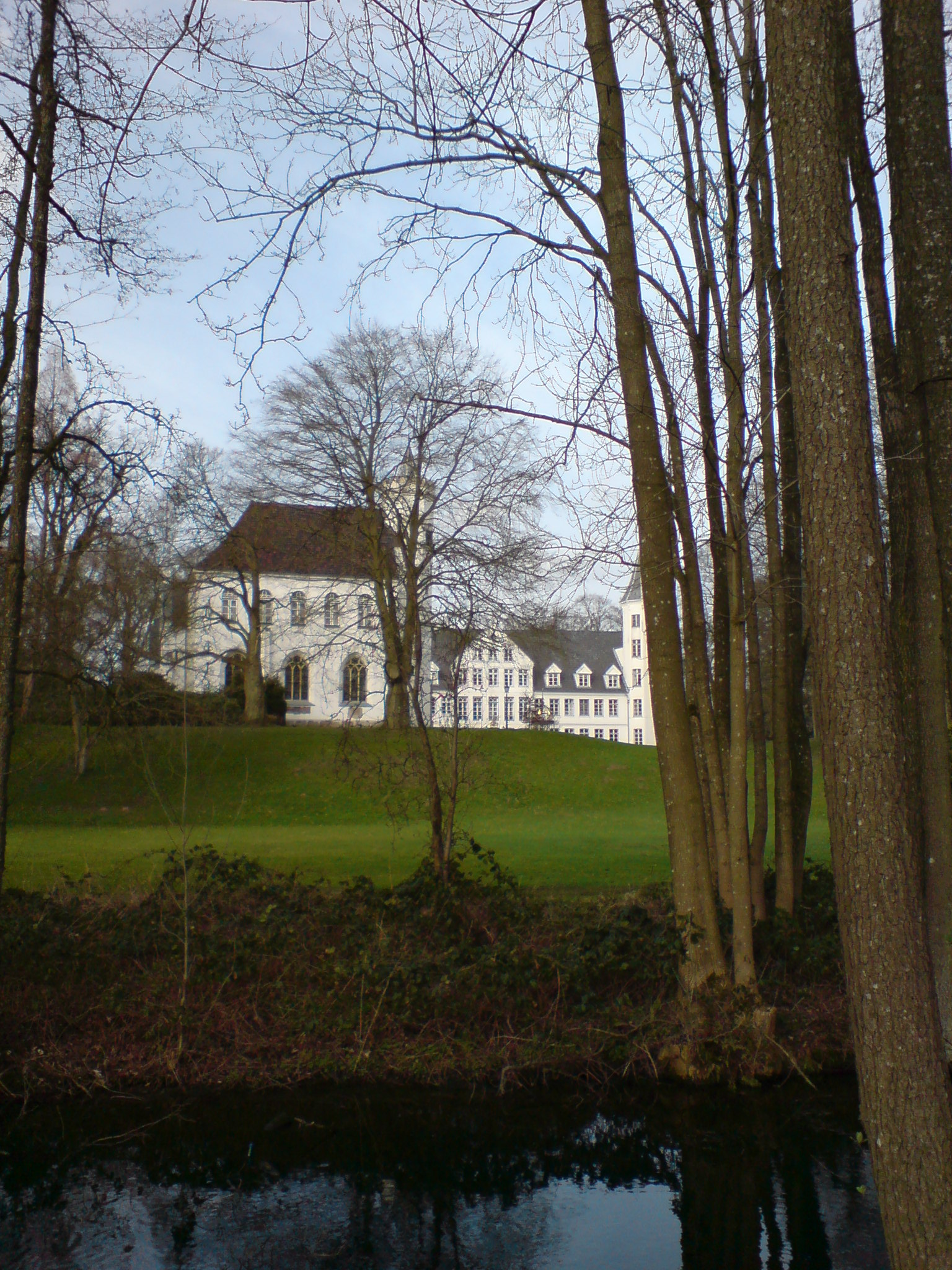 Description=Breitenburg_Garten_Kapelle Source=myself Date=03.2008 Author=PodracerHH